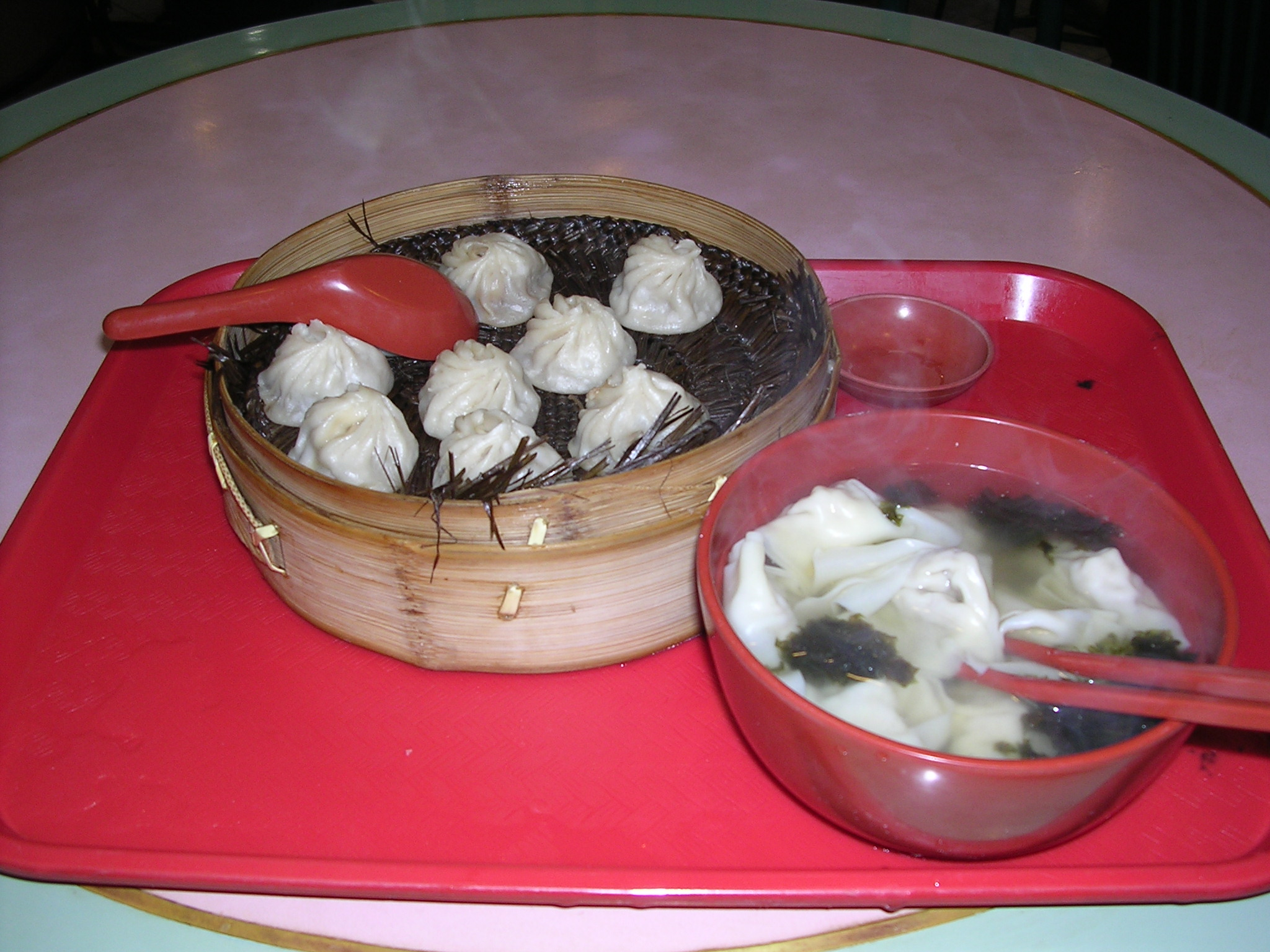 杭州知味观的馄饨和小笼，Hamham拍摄。